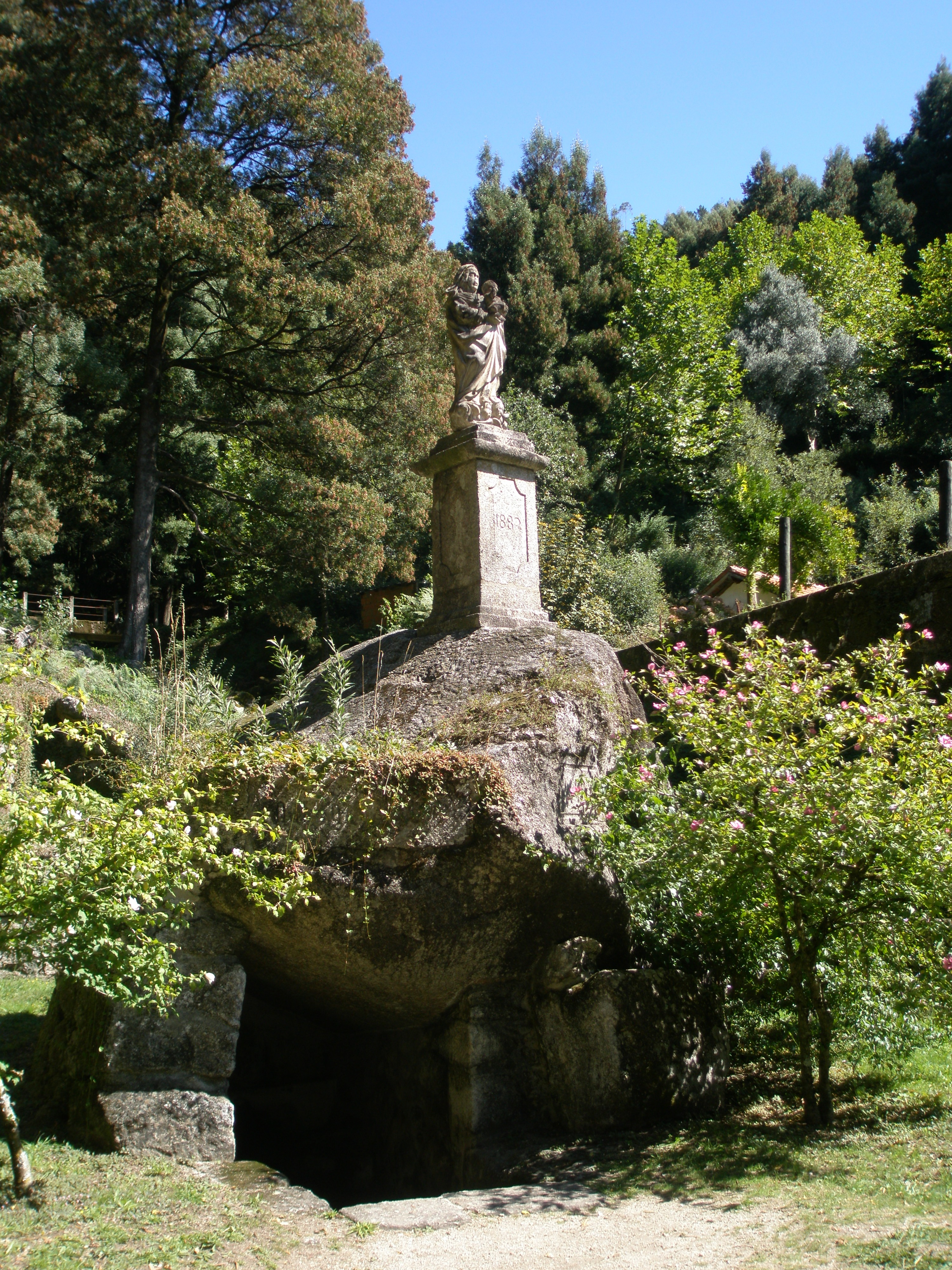 Gruta onde foi encontrada a imagem